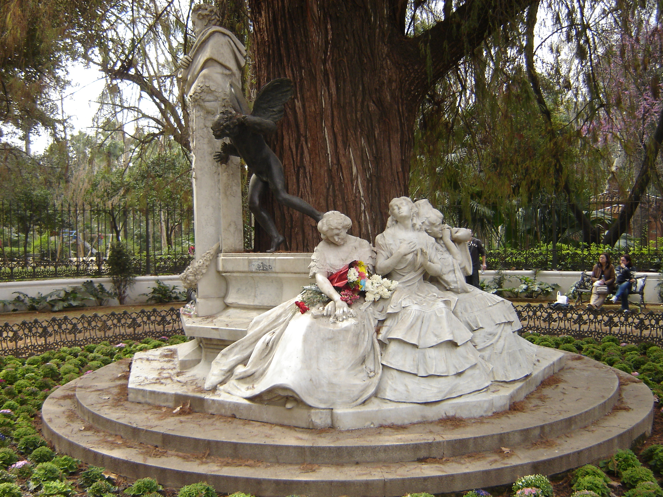 Glorieta de Bécquer, en el Parque de María Luisa (Sevilla). Imagen alegórica representando a "el amor ilusionado", "el amor poseído" y "el amor perdido". Las flores las depositan los enamorados que aún creen en tan bello sentimiento. Realización propia.